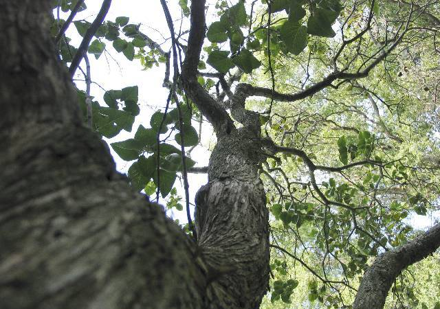 Syringa vulgaris aka the wood getter